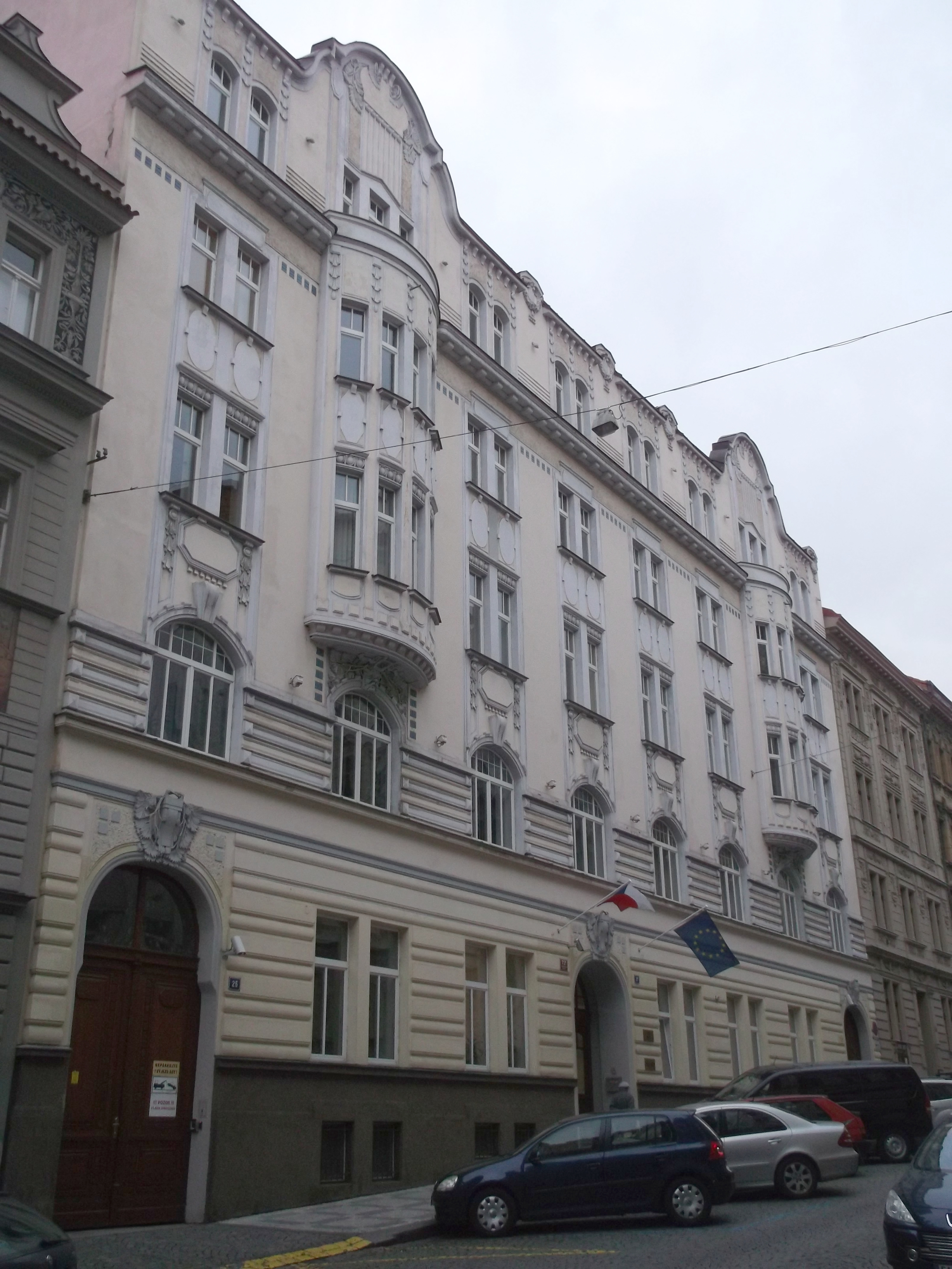 Praha 7, Pplk. Sochora 27 - sídlo ÚOOÚ